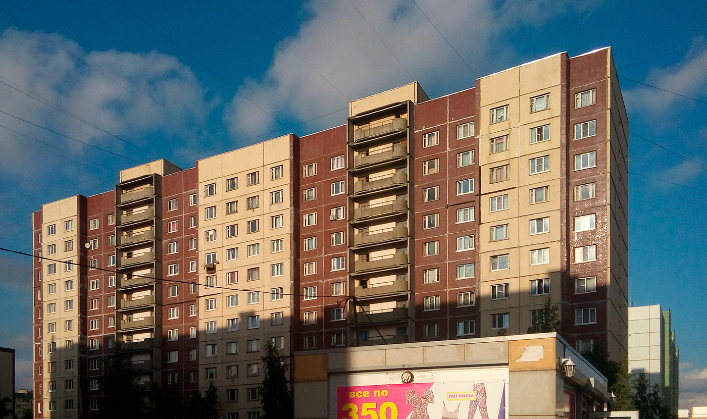 Жилой дом в Колпино по ул. Ижорского Батальона, 19